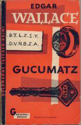 Edgar Wallace: Gucumatz. Goldmann Verlag, München, 1962.